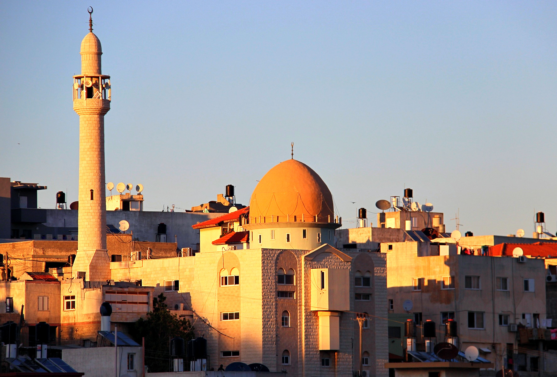 مسجد في قرية مشيرفة الفلسطينية.